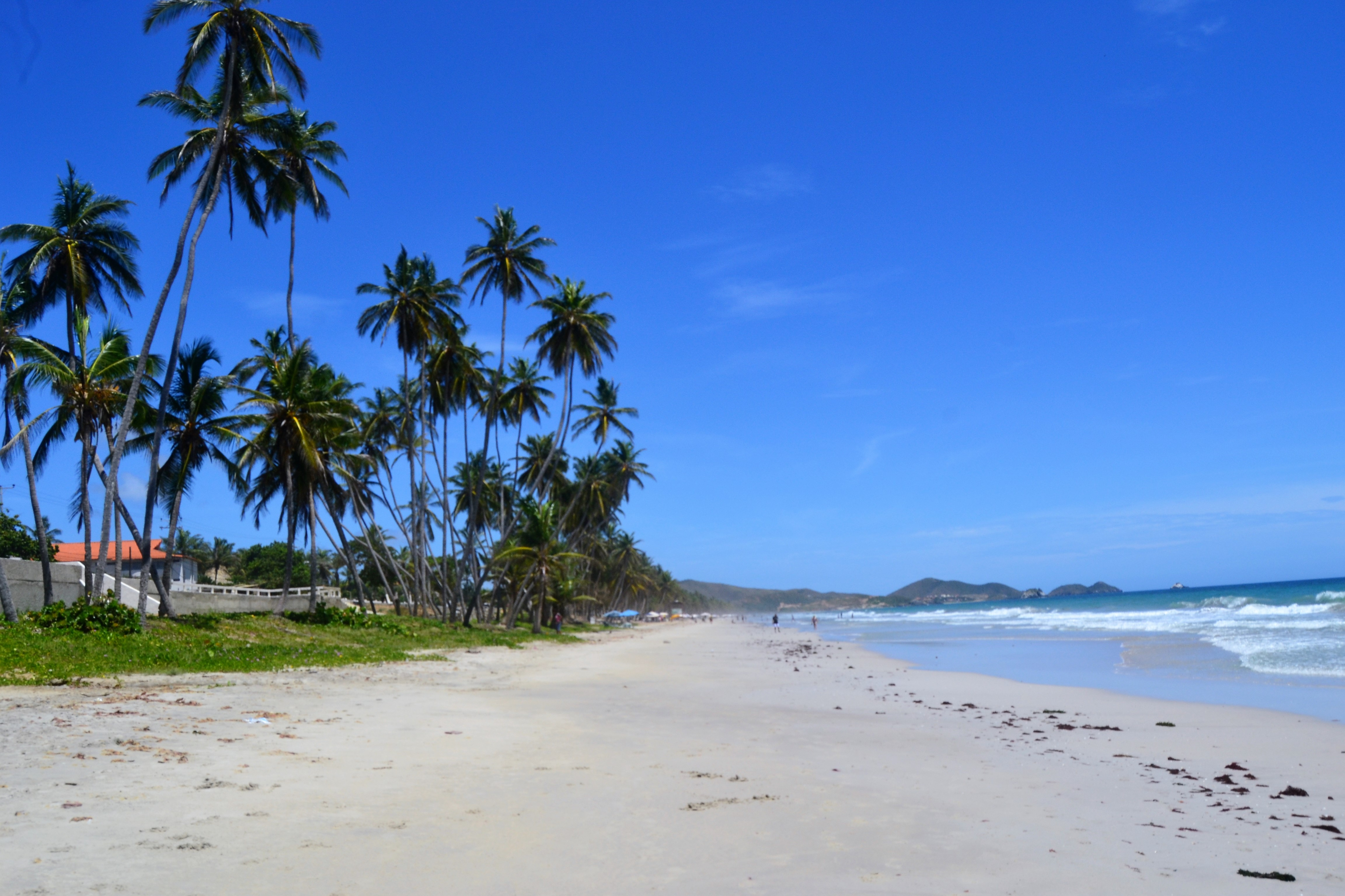 Esta foto fue tomada por Juan Pablo Jaimes en Playa el Agua una de las playas mas celebres de la isla de Margarita